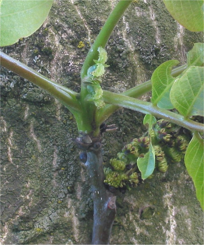 Walnoot Juglans regia vrouwelijke bloem (female flower)